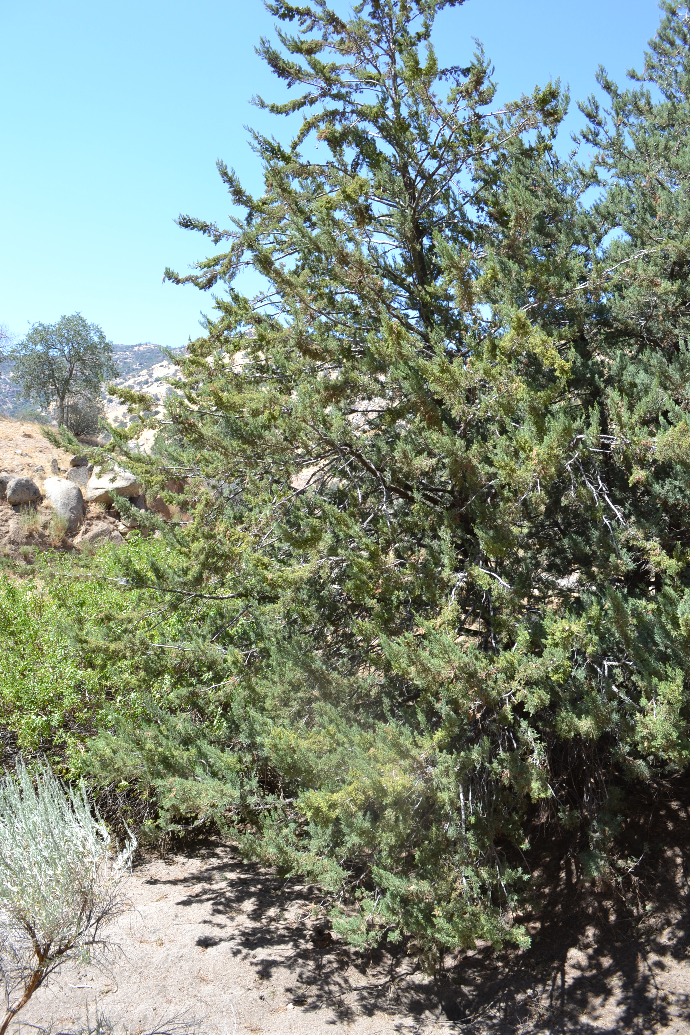 Cupressus nevadensis Hobo Ridge Grove (9)